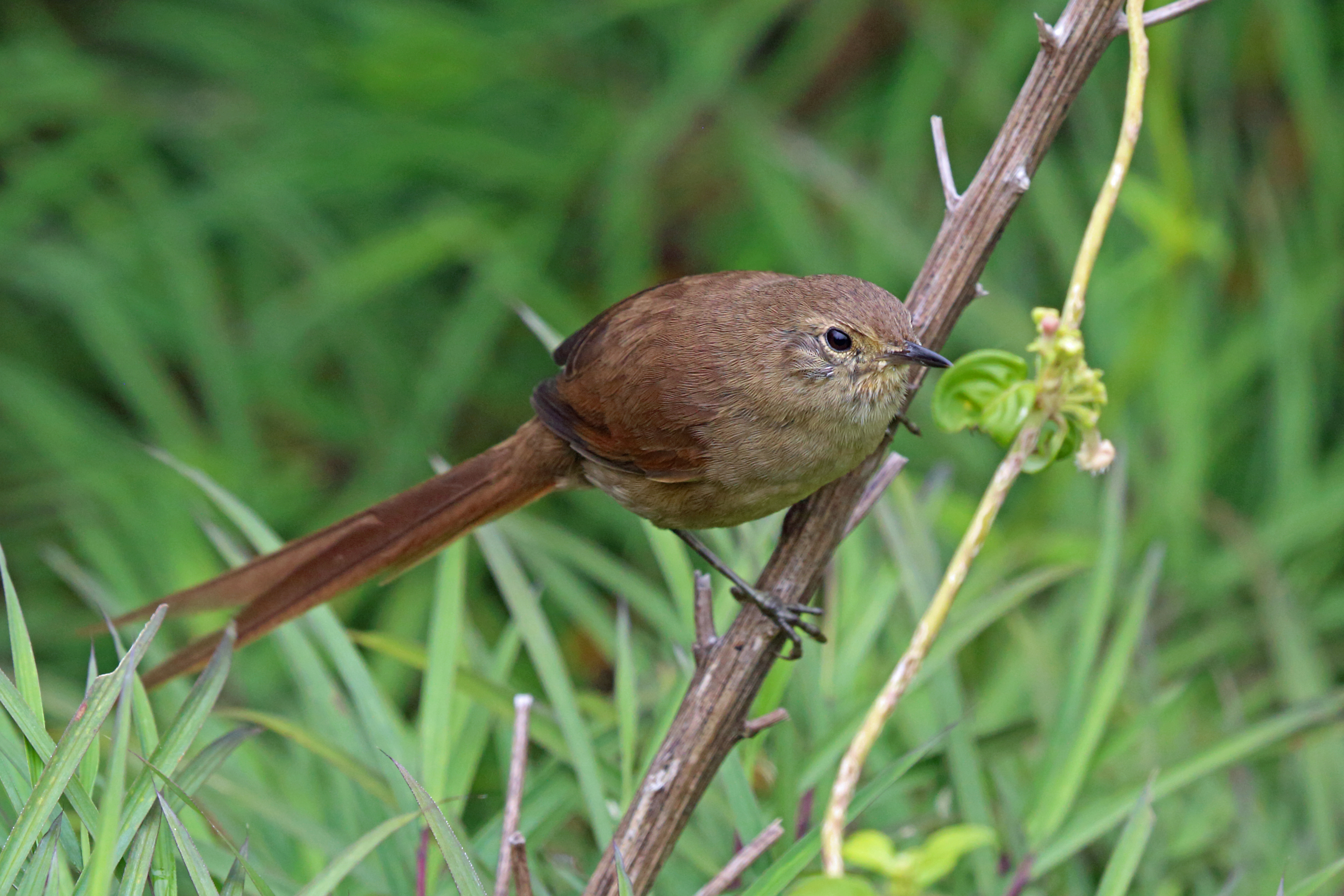 Itatiaia Spinetail, Pico de Caledonia, Brazil